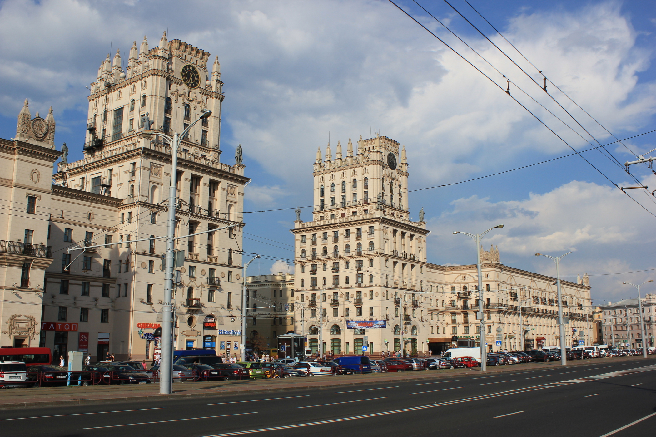 Minsk; Leninplatz vor dem Hauptbahnhof mit Eingang zur Kirowstraße.